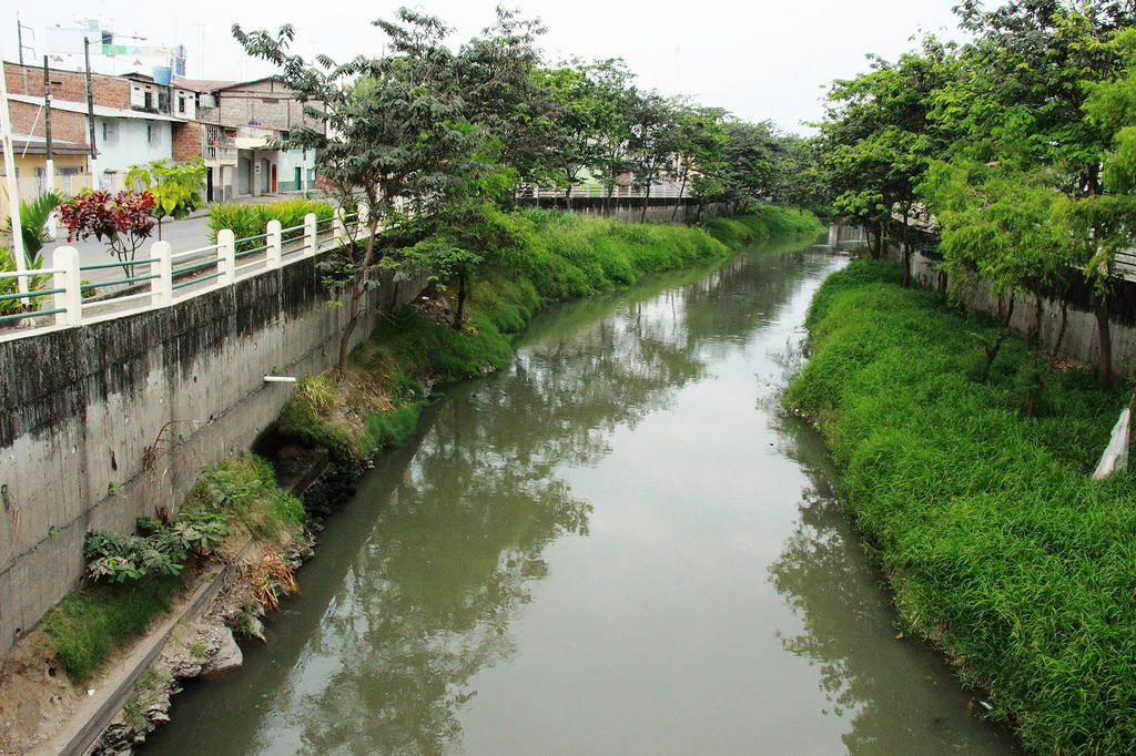 Río principal del cantón Milagro